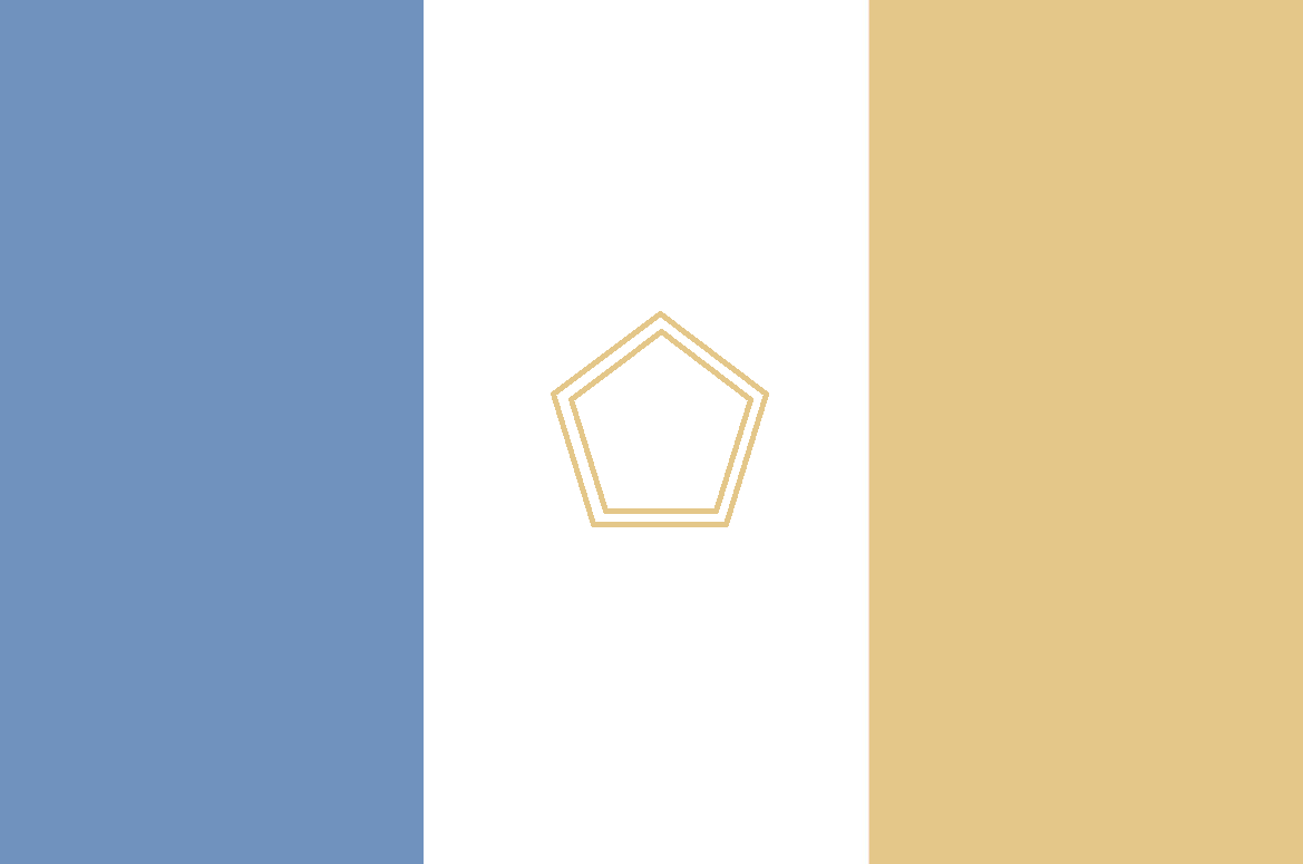 Bandera de Municipio Santos Marquina, Estado Mérida, Venezuela. Gaceta N°064 de la Alcaldía Federal de Santos Marquina, Comite de Promoción Patrimonial.